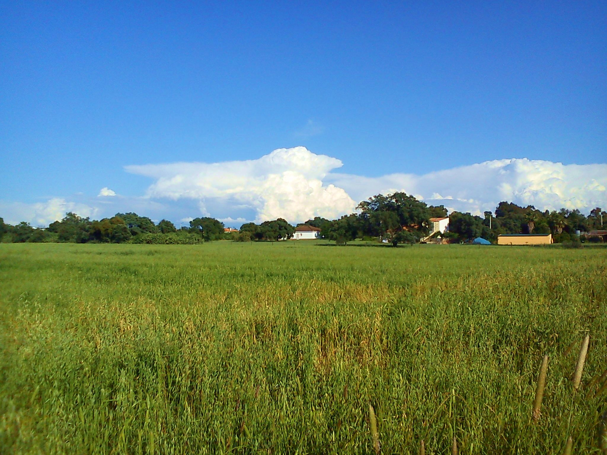 Campos de cereal característicos del clima mediterráneo de El Arrecife